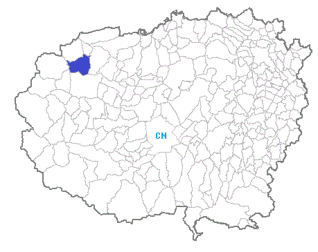 Posizione del comune nella provincia di Cuneo